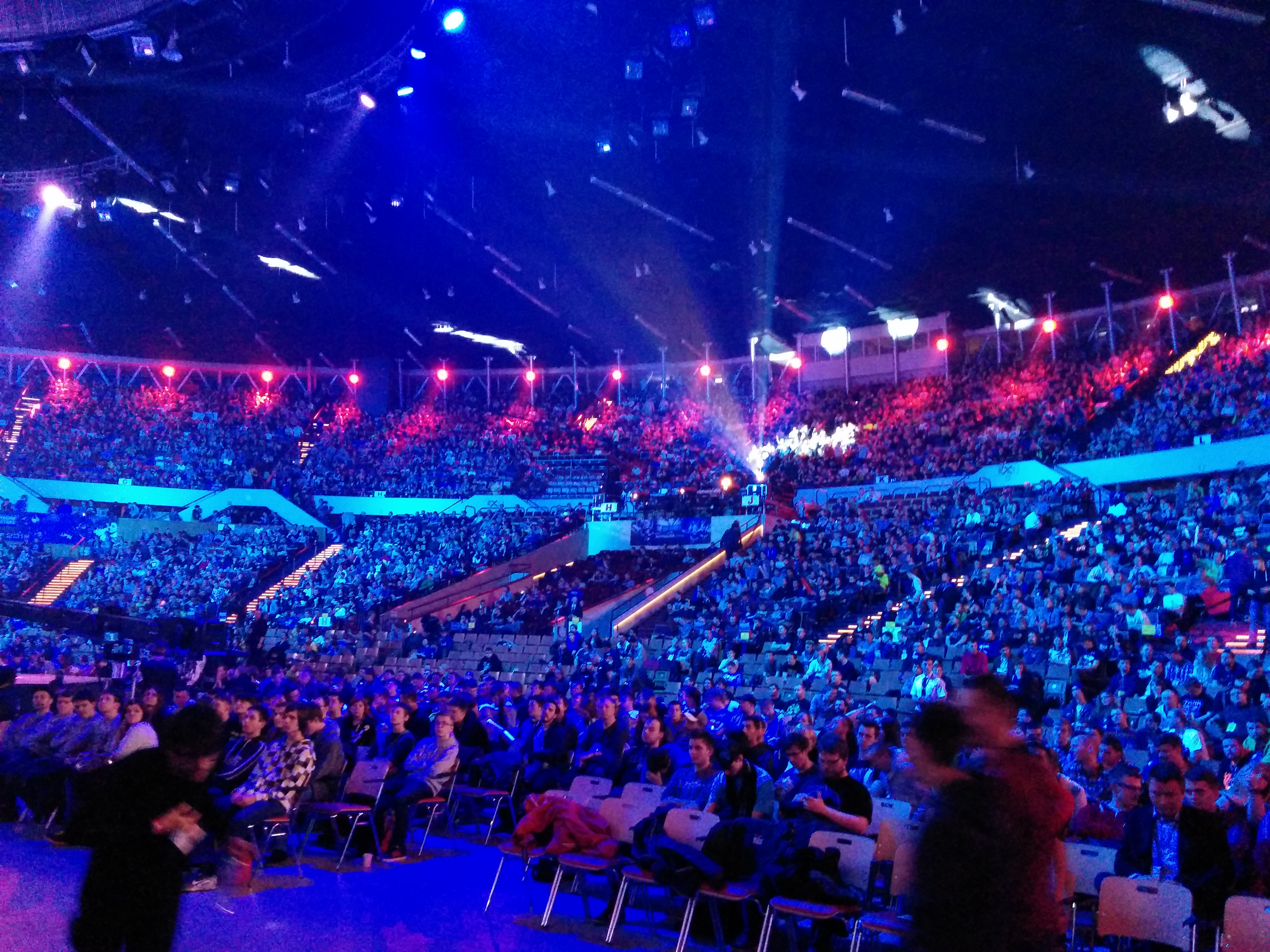 Zuschauer verfolgen ein E-Sport-Match im Rahmen der IEM Katowice 2015 im Spodek